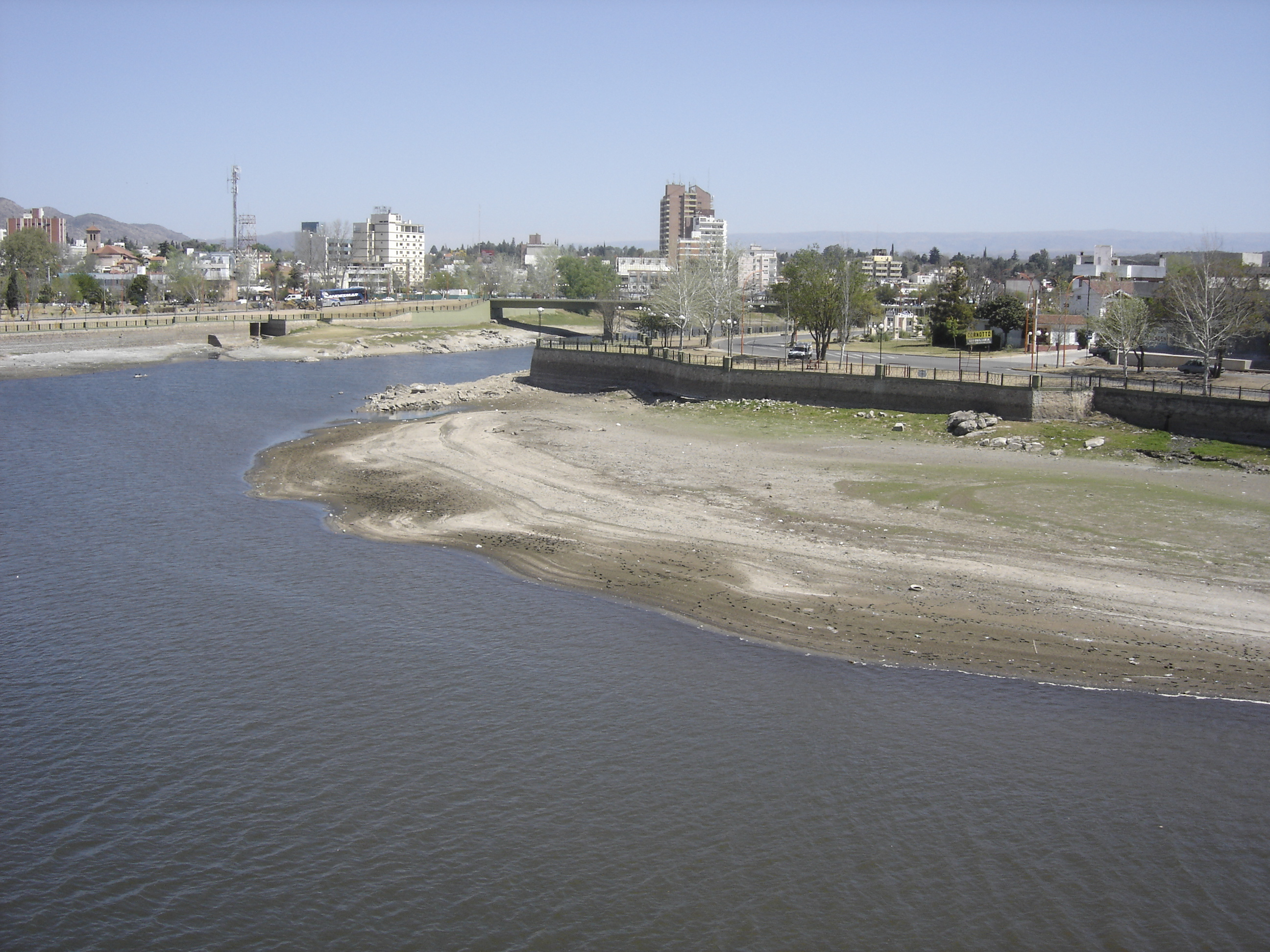 Vista de Villa Carlos Paz, Provincia de Córdoba, Argentina